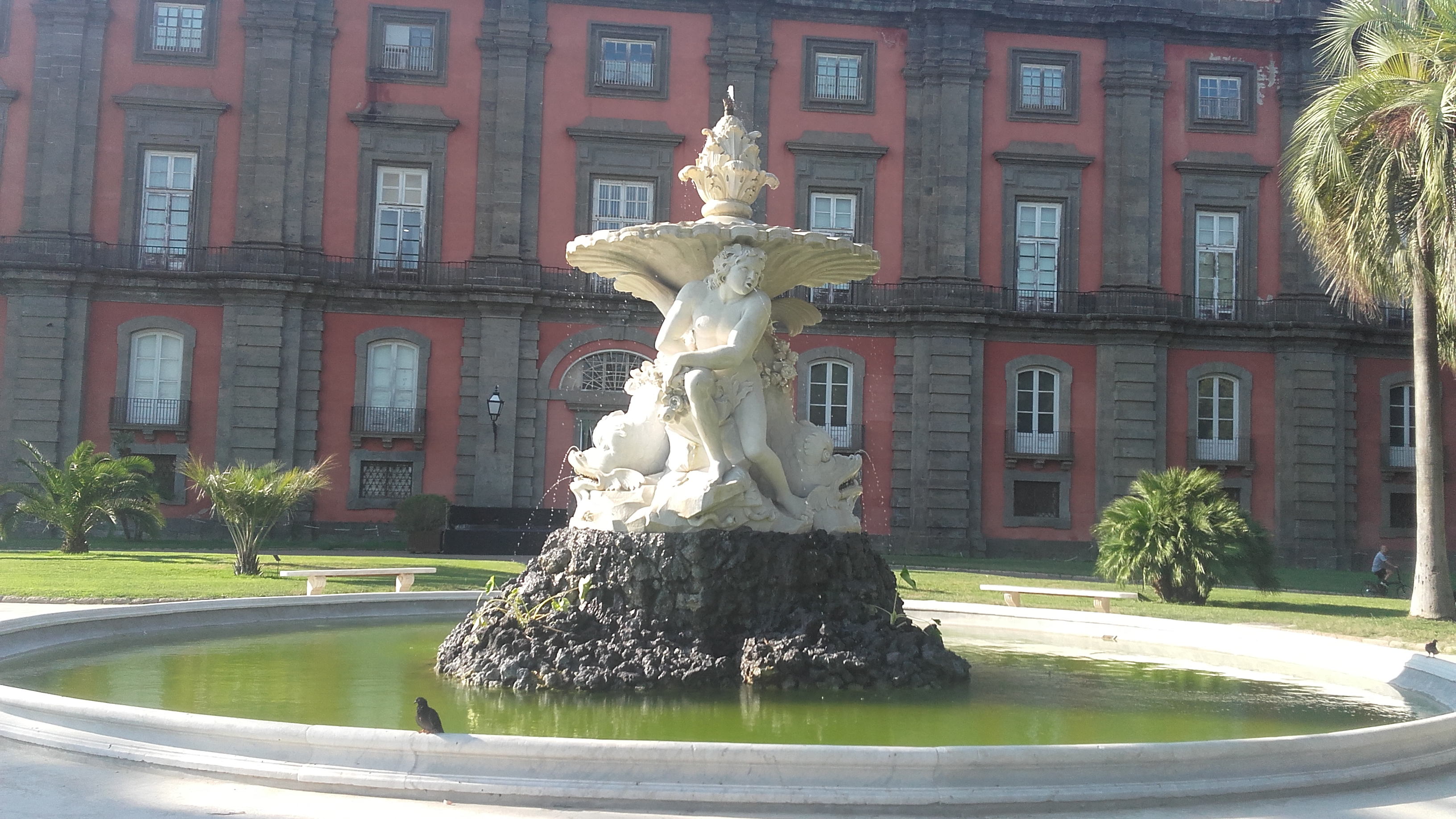 Si tratta della più bella ed importante fontana tra quelle che ornano il Parco di Capodimonte.